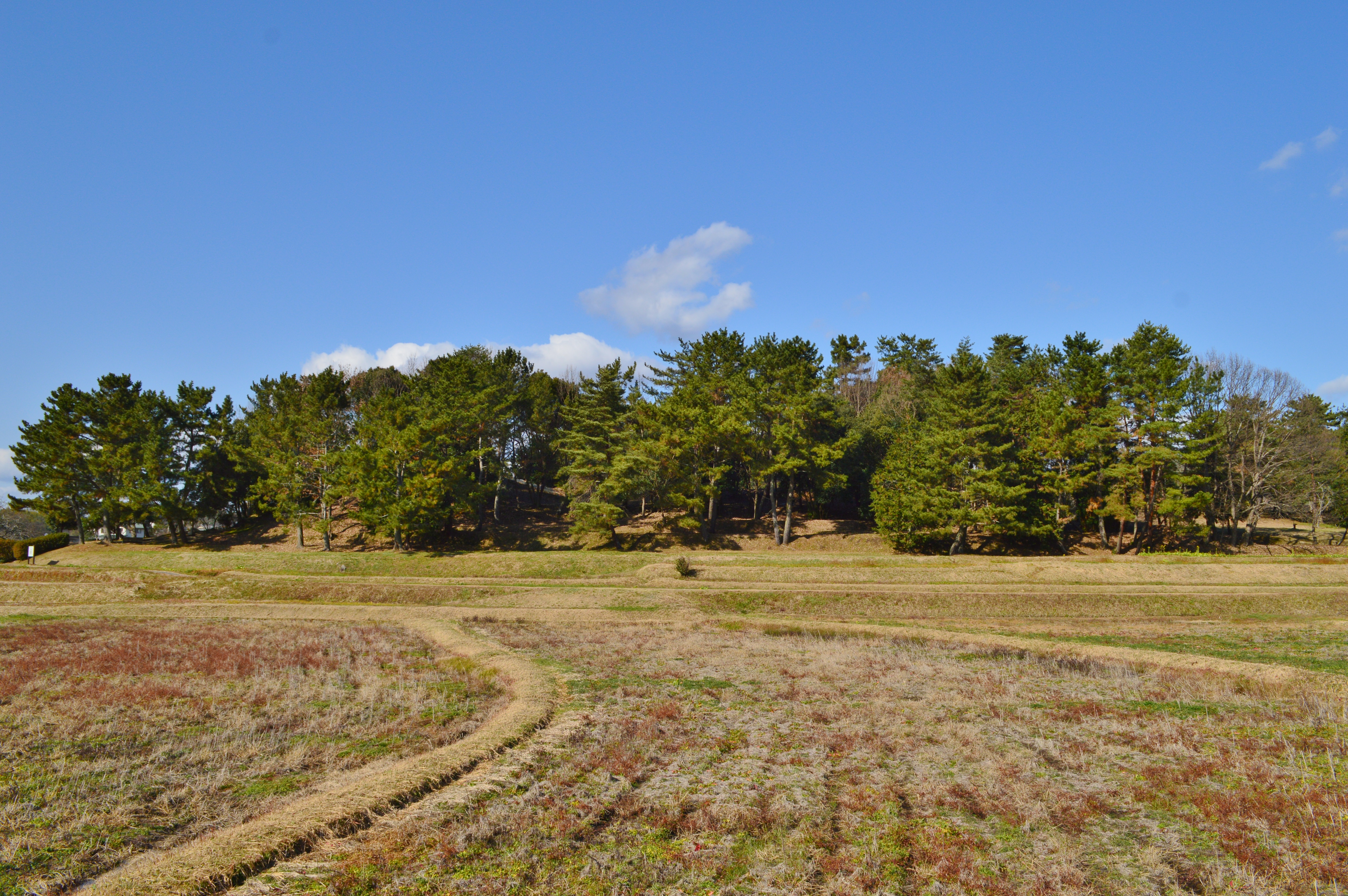 こうもり塚古墳 墳丘全景